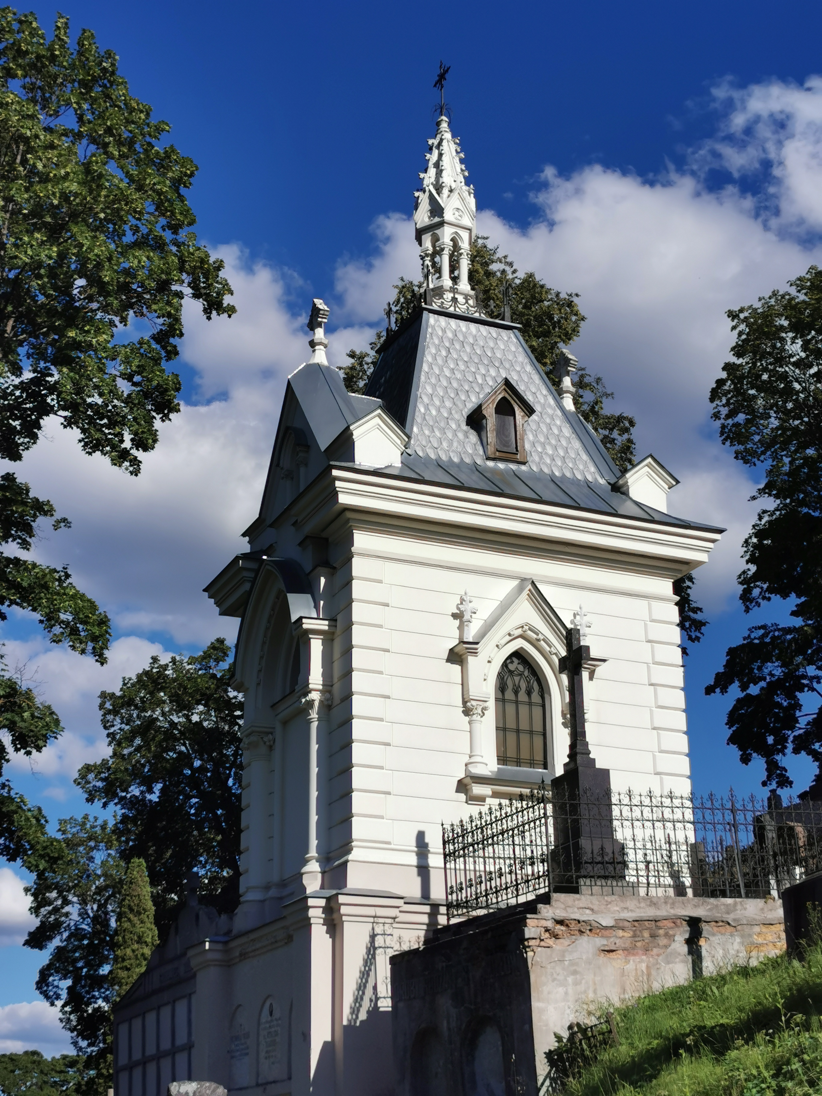 Vileišių koplytėlė-mauzoliejus